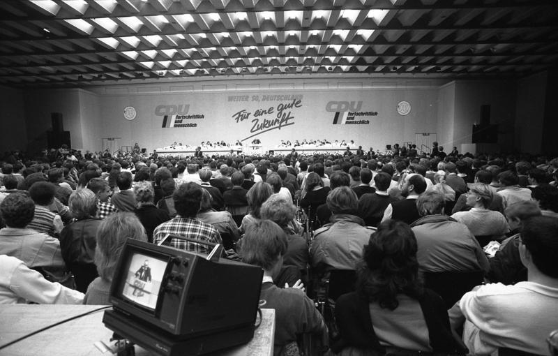 23.11.1986 Deutschlandtag der Jungen Union in Köln, Messegelände. Gastredner: Bundeskanzler Dr. Helmut Kohl und der Generalsekretär der CDU, Dr. Heiner Geißler, u.a. Junge Union verabschiedet Positionspapier für Menschenrechte und Verurteilt Versöße dagegen in der DDR, Chile, der Sowjetunion, Südafrika, Afghanistan und Nicaragua.